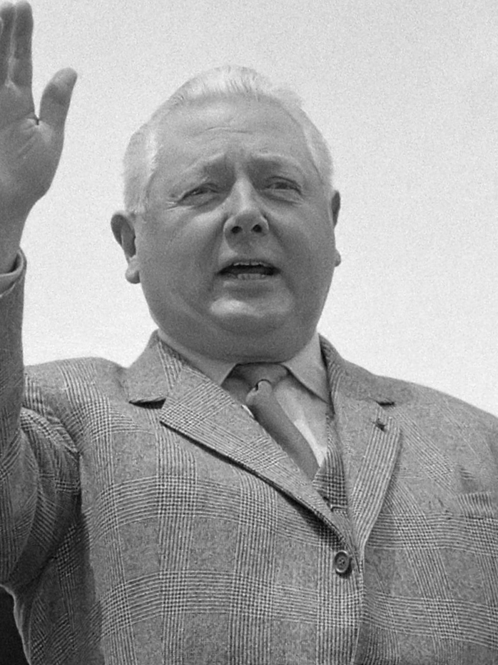 Eduard Flipse naar Scarbarough 13 juni 1961